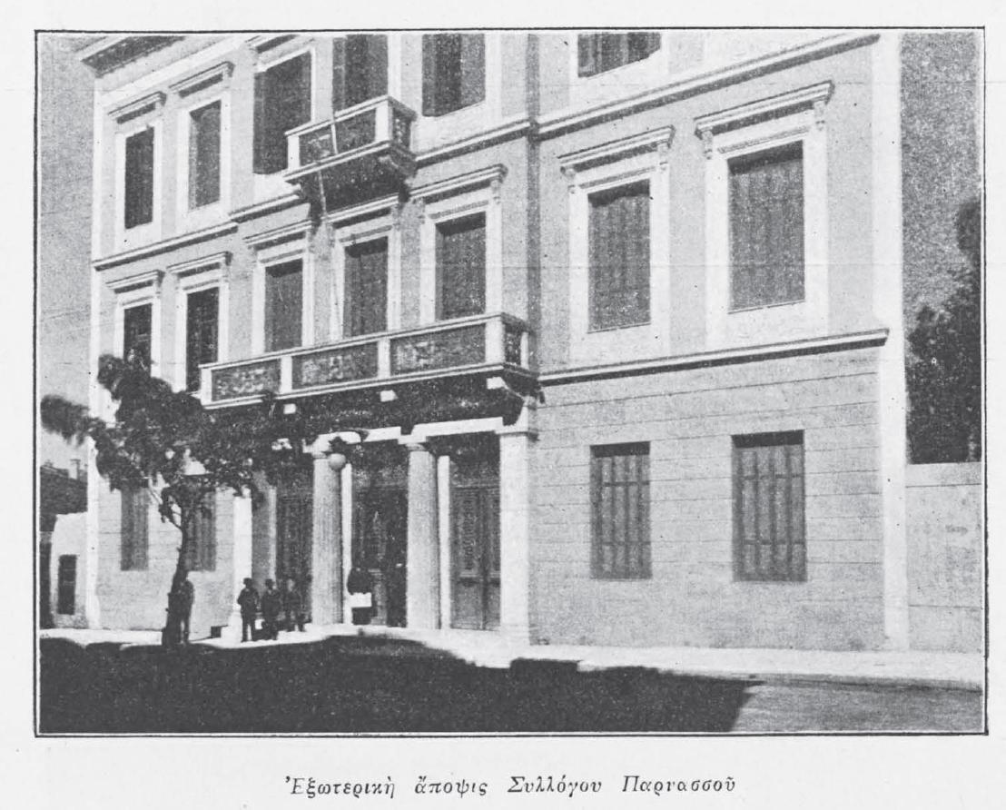 Σύλλογος Παρνασσού. Εξωτερική άποψη του κτιρίου